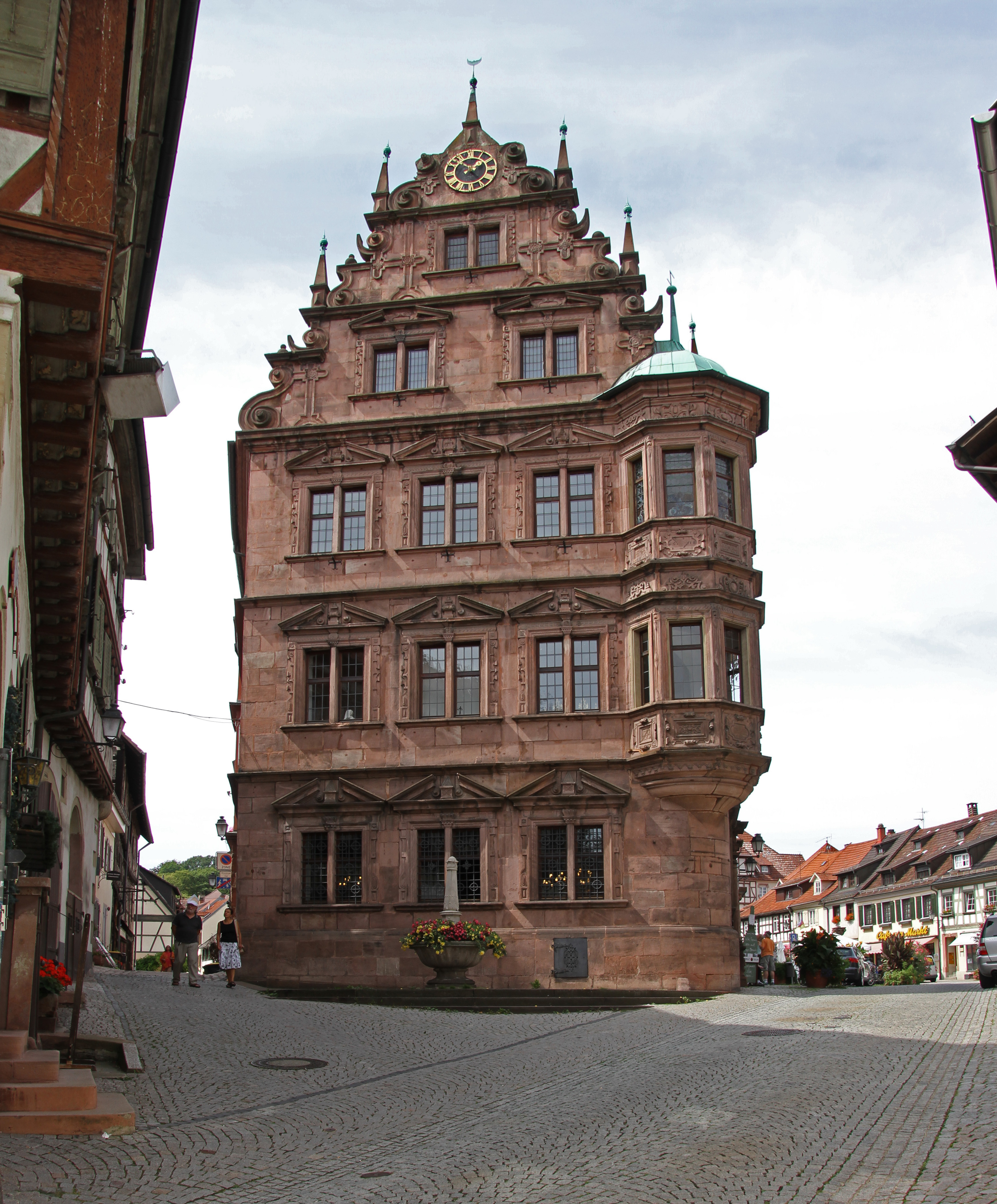 Altes Rathaus in Gernsbach.